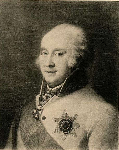 Ivan Ivanovich Mikhelson, 1739-1807